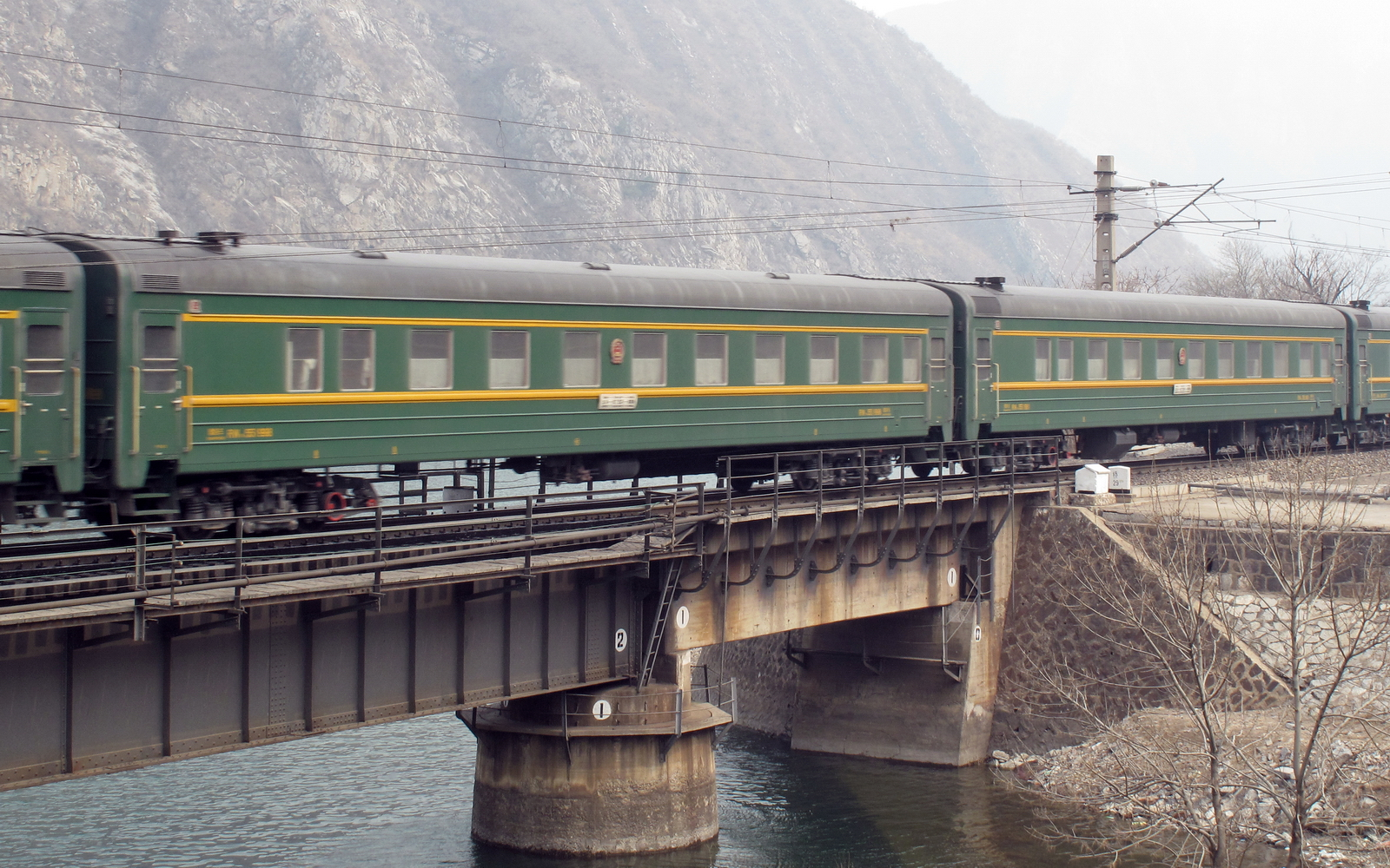 国际旅客列车编组中的RW18型客车